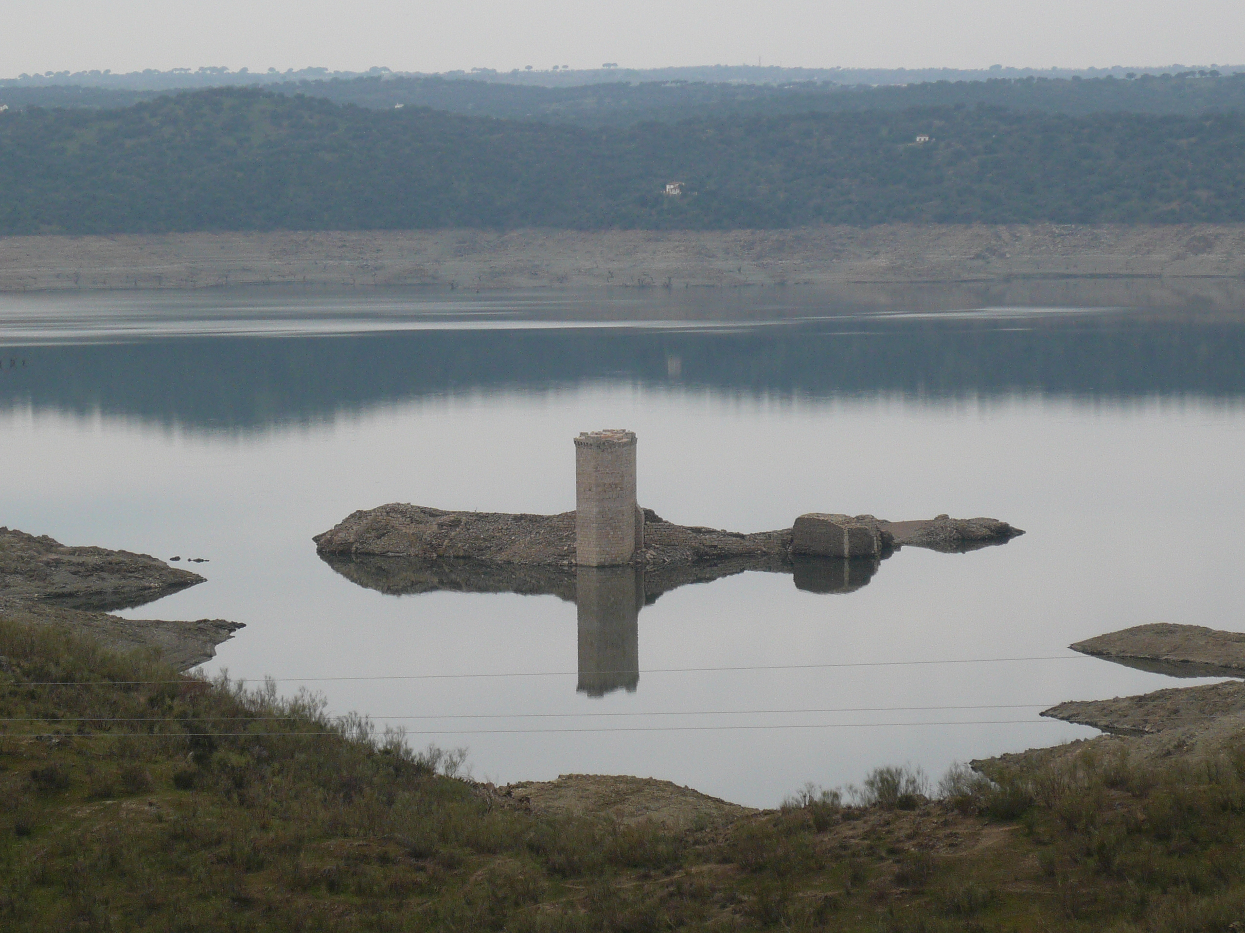 Torre del castillo de Floripes, hoy dentro del Embalse de Alcántara, en Garrovillas (Cáceres).